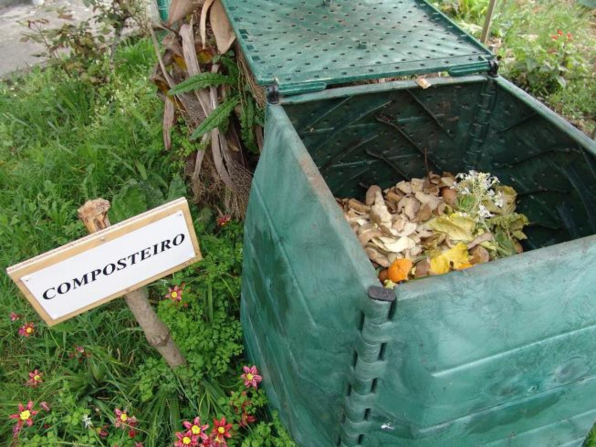 Composteiro.